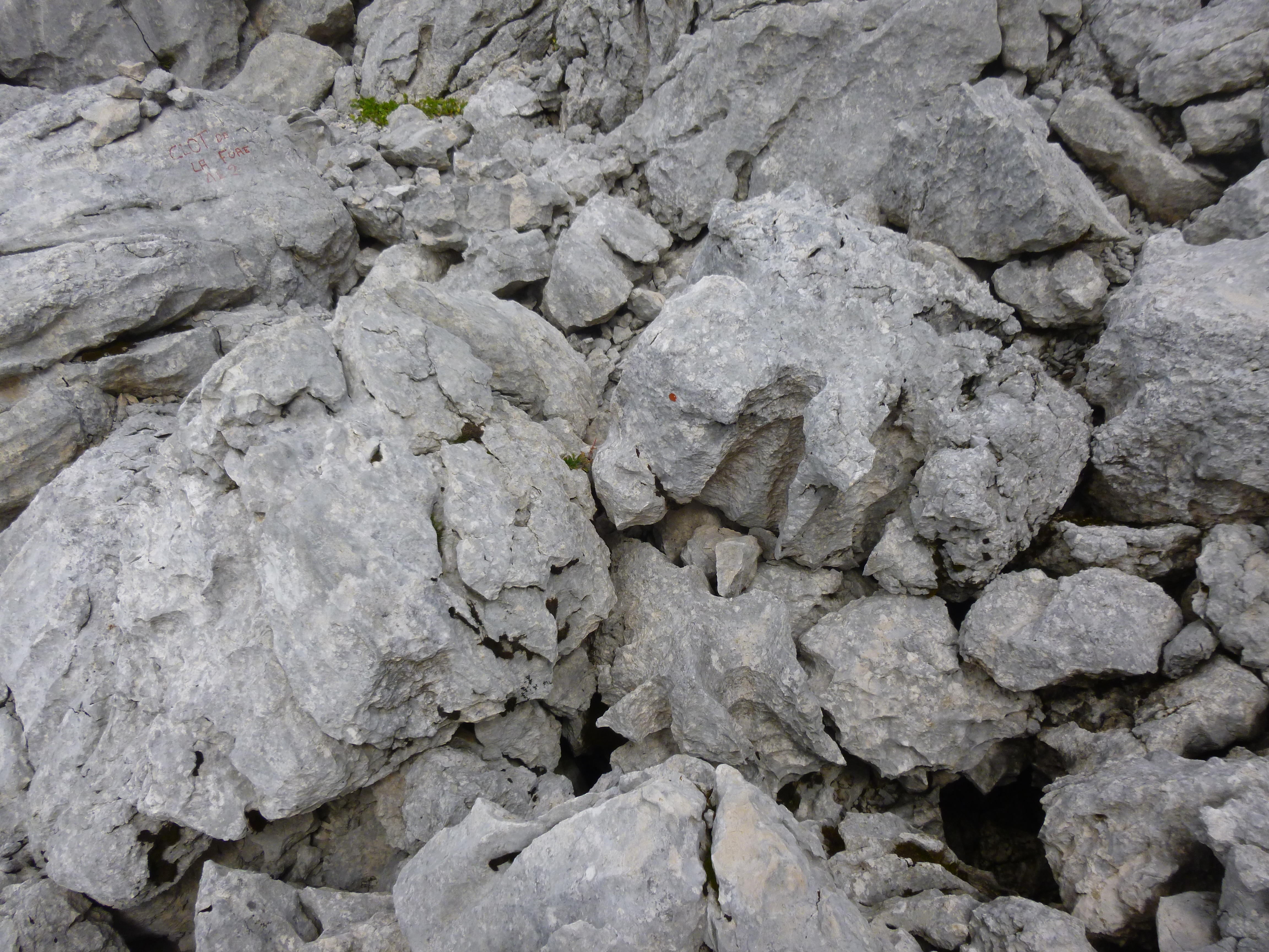 Située sous les blocs, l'entrée est difficile à localiser (en bas à droite).